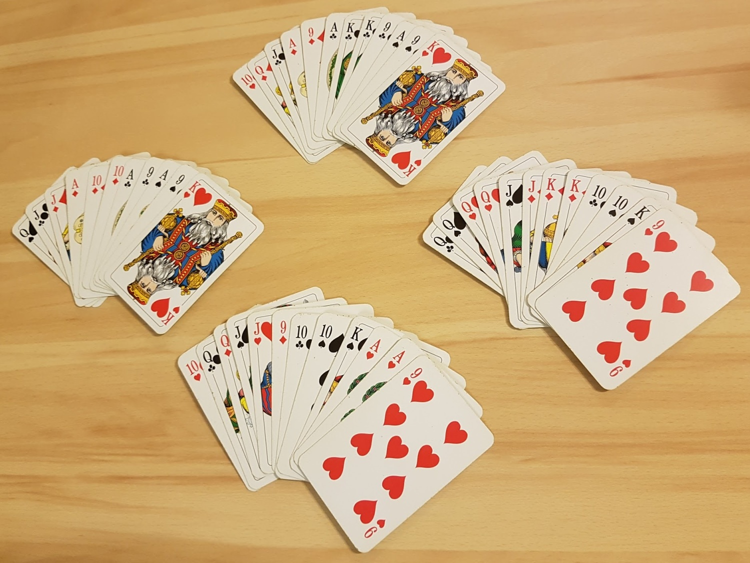 Zdjecie kart w rozgrywce Doppelkopf.